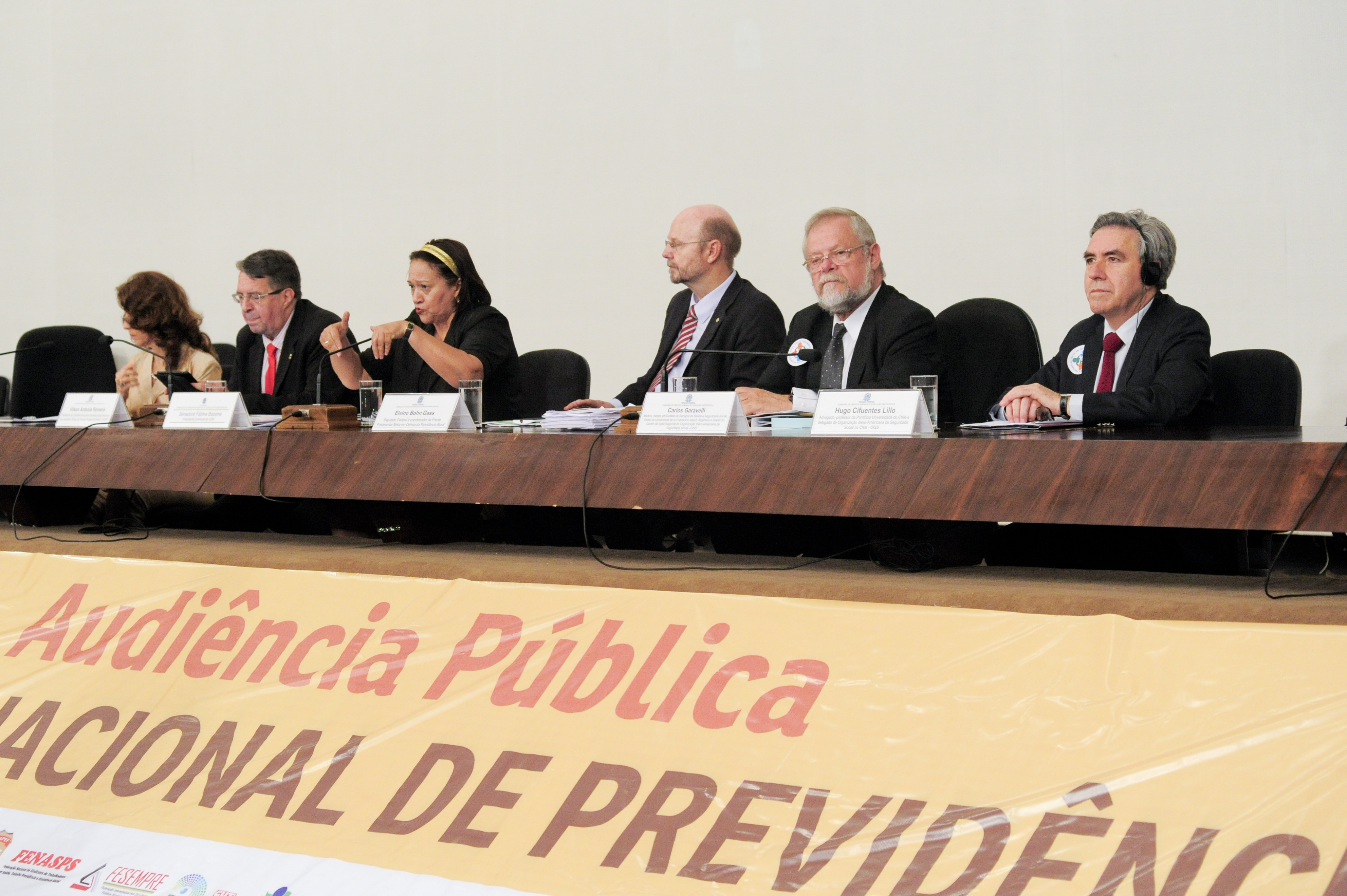 Comissão de Direitos Humanos e Legislação Participativa (CDH) realiza audiência pública interativa para debater sobre: "As Propostas de Reforma da Previdência". Mesa: presidente da Fundação Anfip de Estudos da Seguridade Social e Tributários, Maria Inez Rezende dos Santos Maranhão; presidente do Conselho Executivo da Associação Nacional dos Auditores Fiscais da Receita Federal do Brasil (Anfip), Vilson Antonio Romero; presidente eventual, senadora Fátima Bezerra (PT-RN); coordenador da Frente Parlamentar Mista em Defesa da Previdência Rural, deputado federal Elvino Bohn Gasse (PT-RS); médico, mestre em Gestão de Serviços de Saúde e Seguridade Social, reitor da Universidad de la Fundación Isalud, Argentina e diretor do Centro da Ação Regional da Organização Ibero-Americana de Seguridade Social (OISS), Carlos Garavelli; advogado, professor da Pontifícia Universidade do Chile e delegado da Organização Ibero-Americana de Seguridade Social no Chile (OISS), Hugo Cifuentes Lillo Foto: Geraldo Magela/Agência Senado